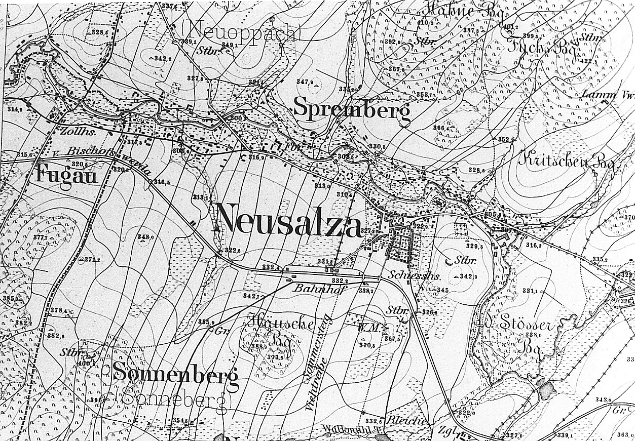 Original image description from the Deutsche Fotothek Neusalza-Spremberg. Meßtischblatt, Sekt. Neusalza, 1883